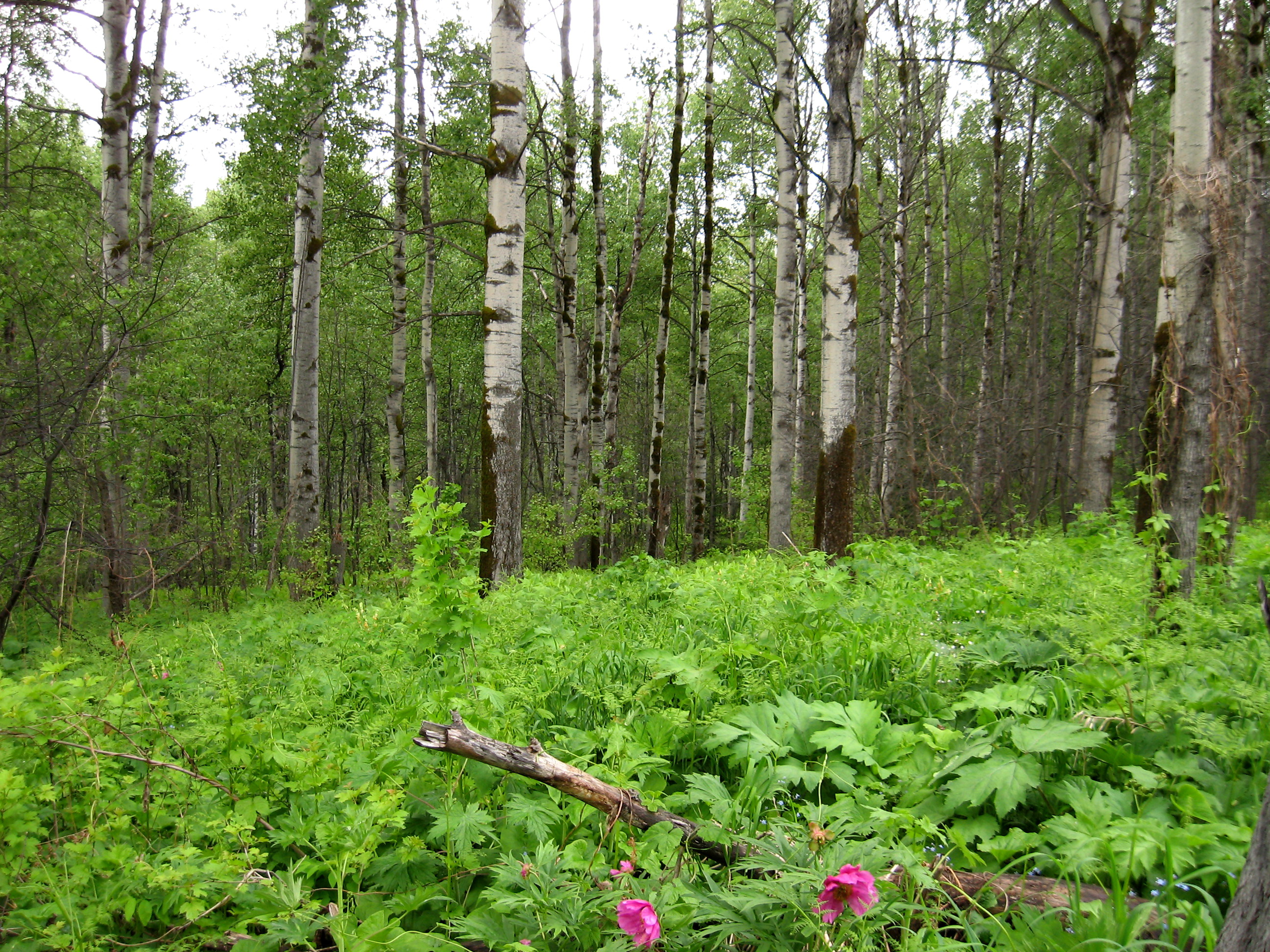 Осинник широкотравно-крупнотравный в черневом поясе Западного Саяна, 350 м н.у.м. Хребет Веховой, Красноярский край, Ермаковский р-н.